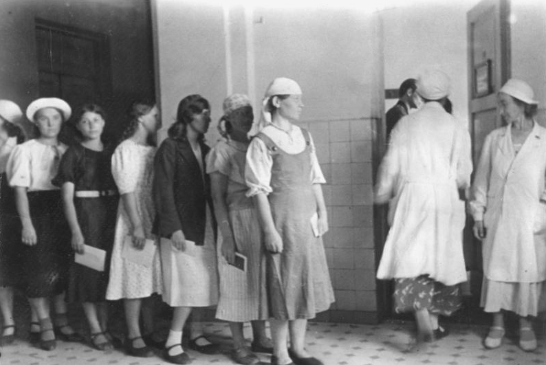 ADN-ZB/Archiv II. Weltkrieg 1939-45 In den von den faschistischen deutschen Truppen besetzten Gebieten der Sowjetunion, Mai 1942 Die Zivilbevölkerung in Artjomowsk (Ukraine) muß sich in dem von der deutschen Verwaltung eingerichteten Arbeitsamt melden, um bei Tauglichkeit als Zwangsarbeiter in der deutschen Rüstungsindustrie eingesetzt zu werden. Vor dem Abtransport nach Deutschland werden die Arbeitsdienstverpflichteten untersucht. Aufnahme: Knödler 3314-42